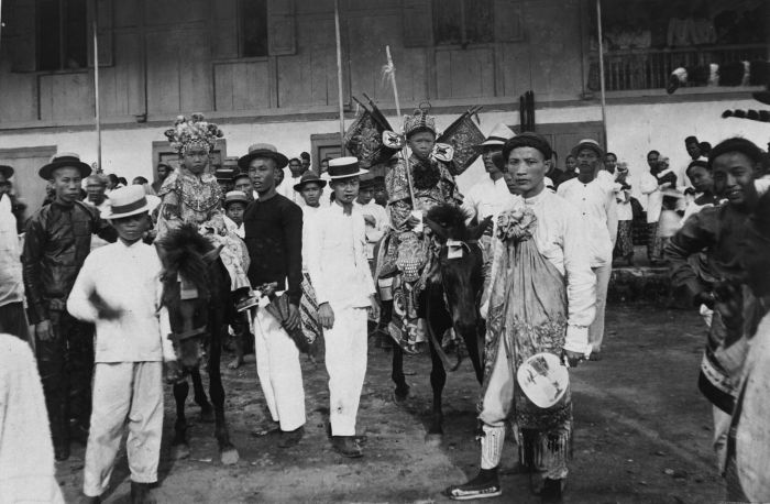 foto. Jongens in ceremoniële kleding te paard tijdens een culturele, sociale of religieuze gebeurtenis te Menado